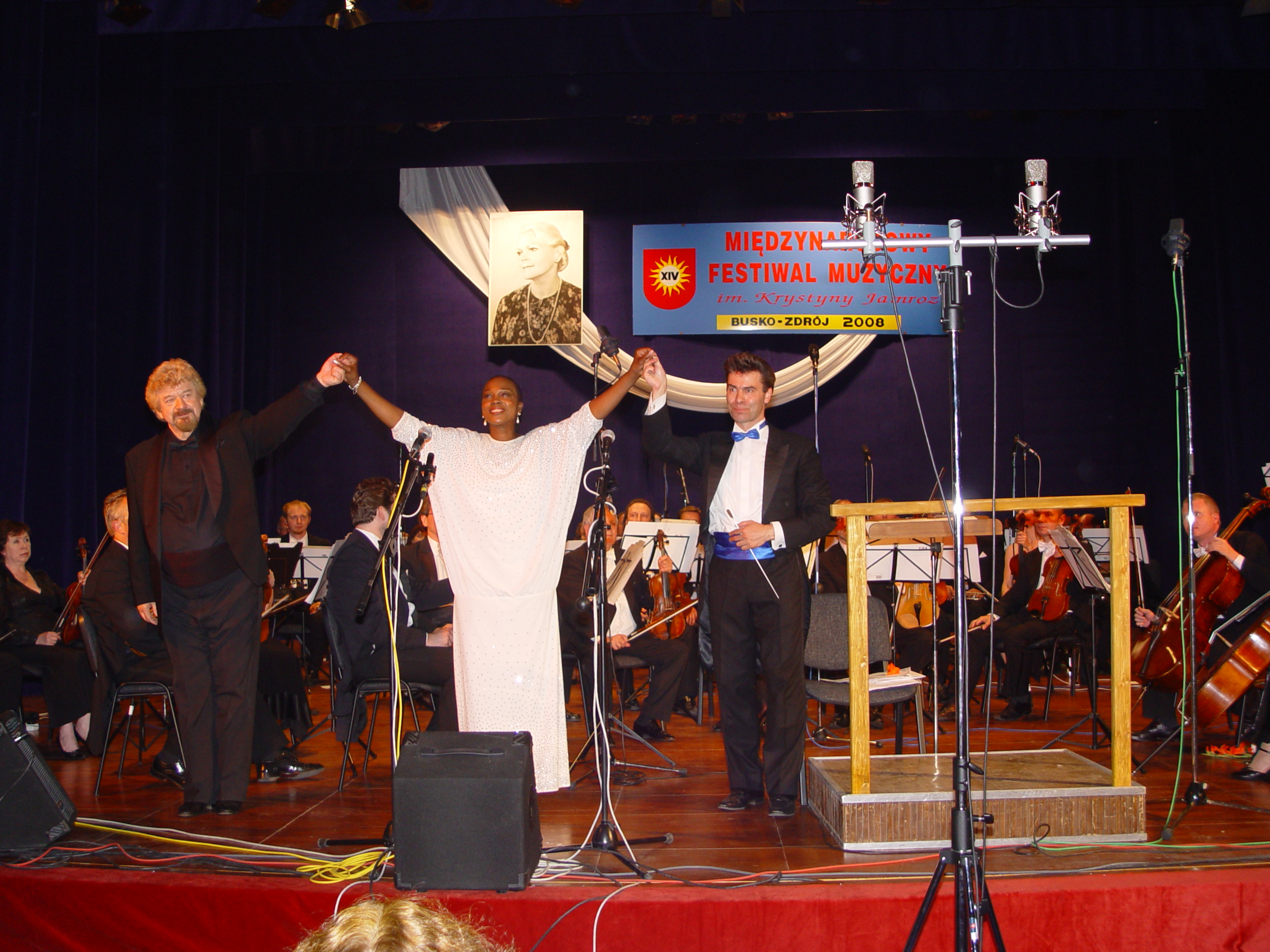 Międzynarodowy Festiwal Muzyczny im. Krystyny Jamroz w Busku-Zdroju, XIV edycja - występ Gwendolyn Bradley i Janusza Wolnego, BSCK, 1 lipca 2008 r.